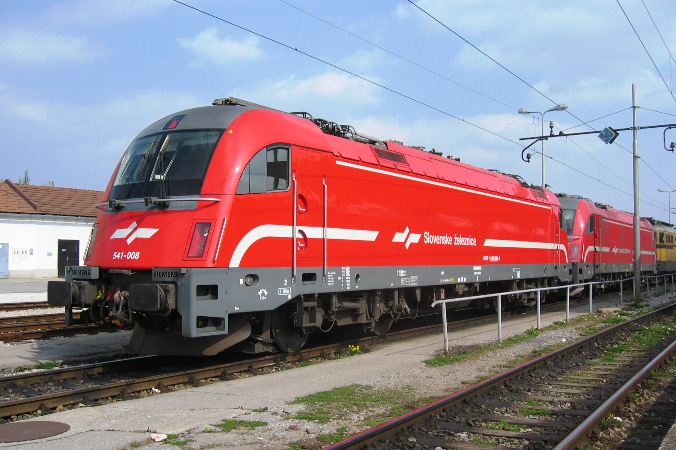 541-008 Slovenian Railways Slovenske železnice, SŽ class 541